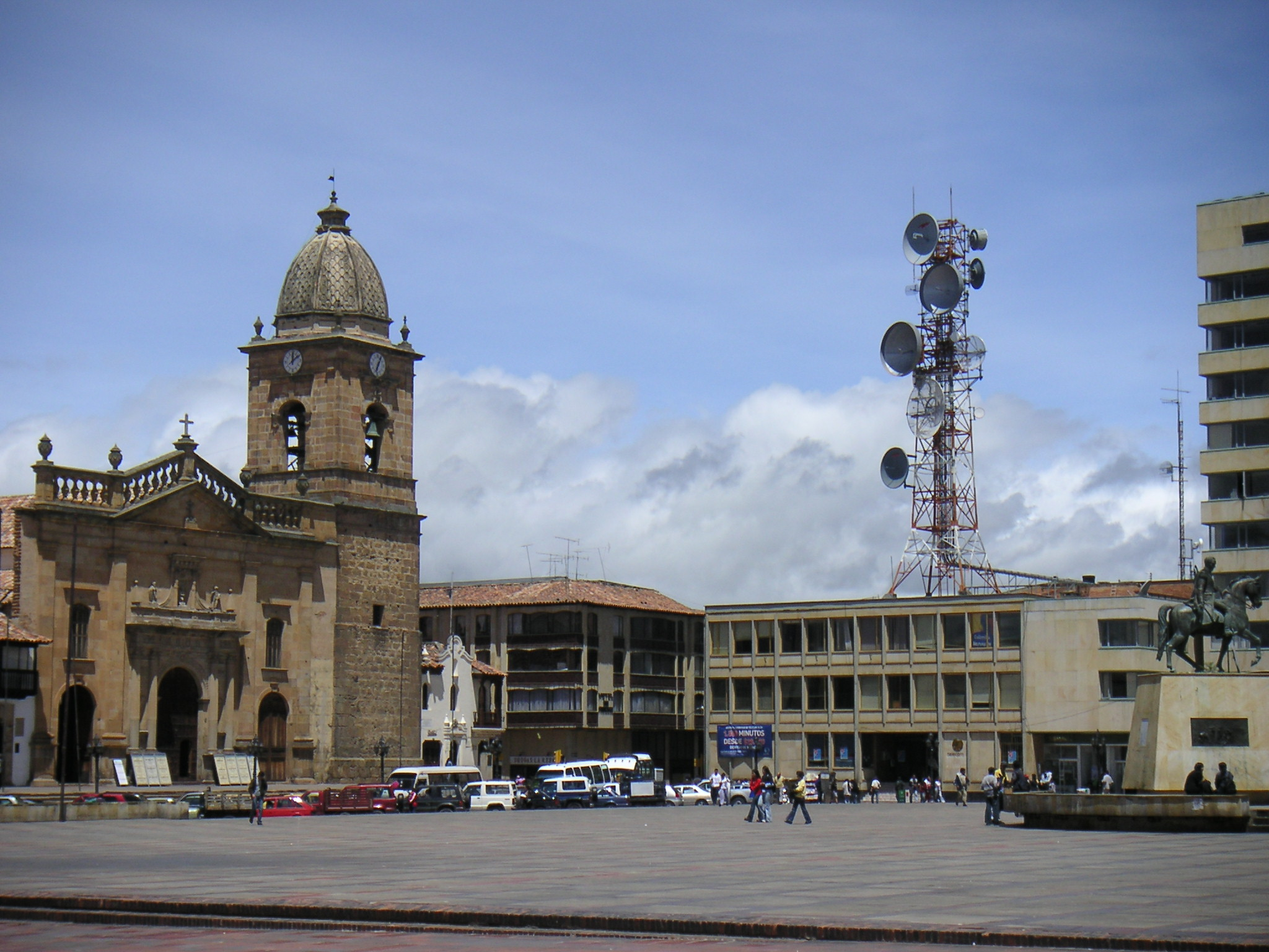 Description: Plaza Central de Tunja, Colombia Source: Louise Wolff (darina), June 2005